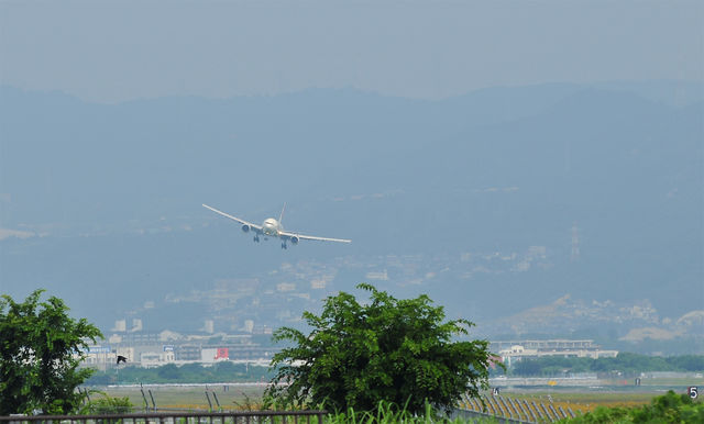 伊丹空港14Rに着陸するJAL機